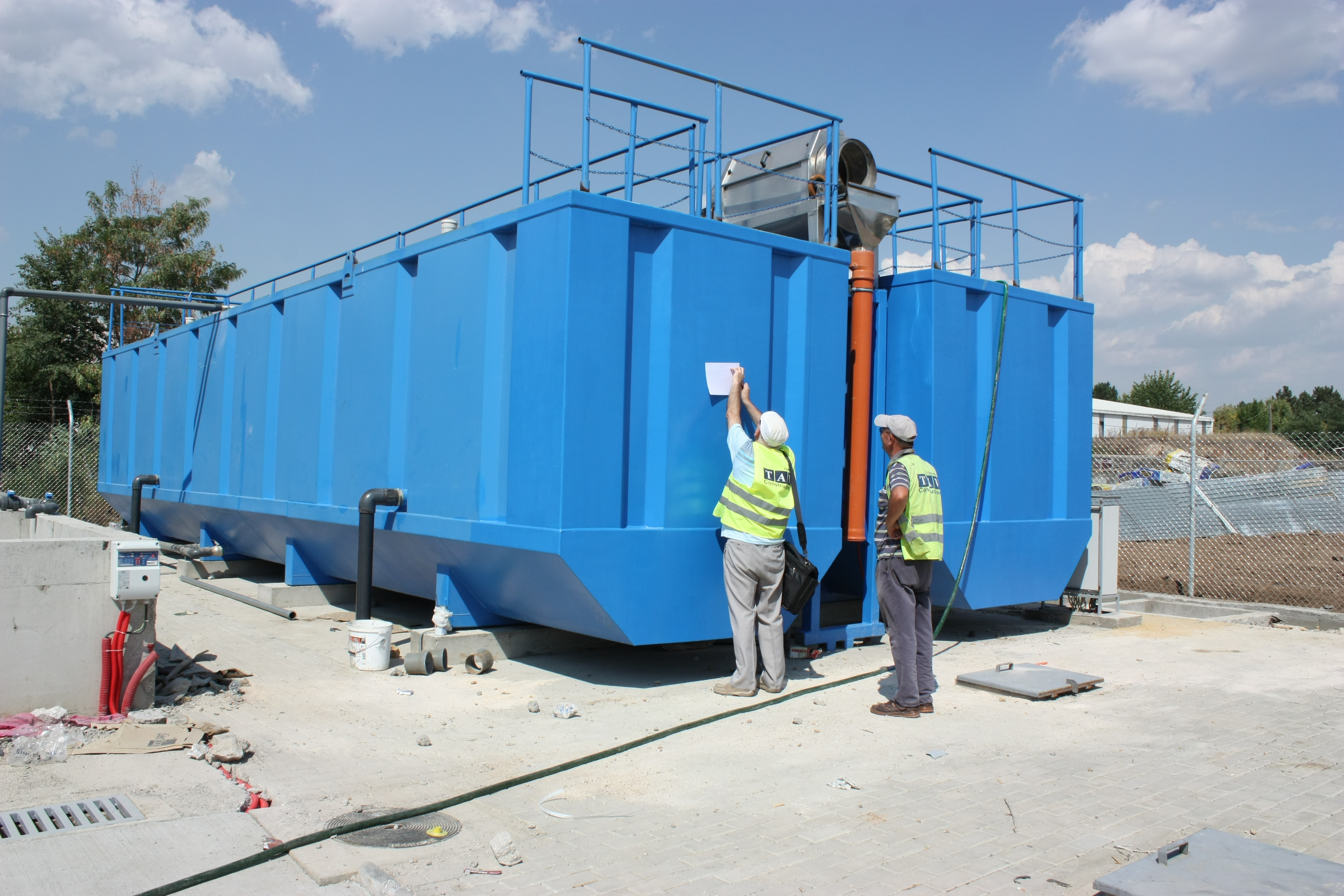 AERDROM MBR SKOPJE